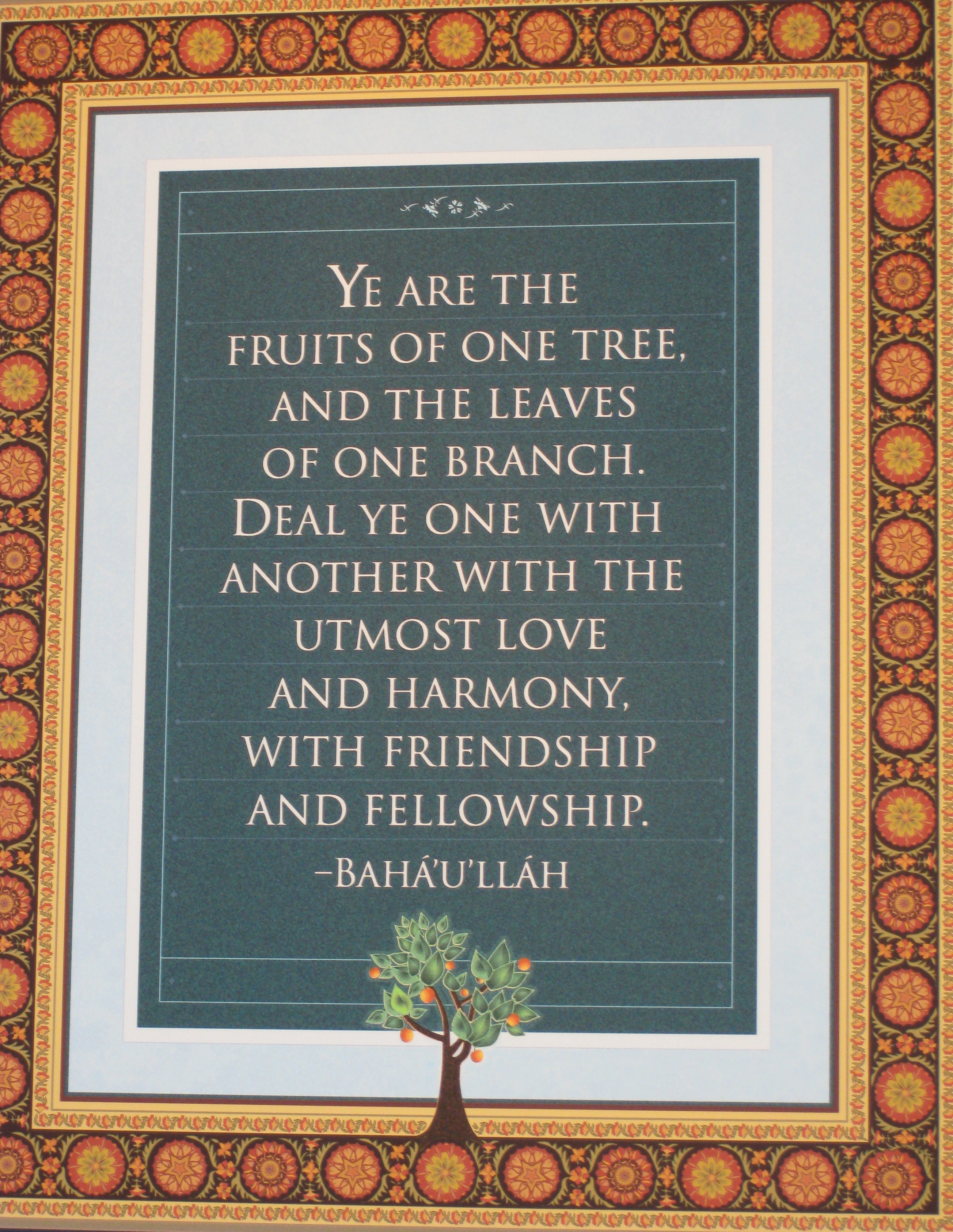 Bahai Texts טקסטים בהאיים במרכז המבקרים שבגנים הבהאיים בחיפה